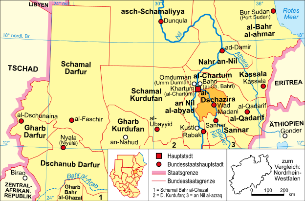 politische Karte des Sudan (Bundesstaat al-Dschazira)